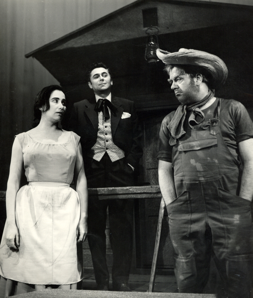 Eugene Gladstone O'Neill, Mesec za nesrečneže, SNG v Mariboru. Na fotografiji: Angelca Jenčič Janko (Josie Hogan), Boris Brunčko (James Tyrone ml.), Arnold Tovornik (Phil Hogan).